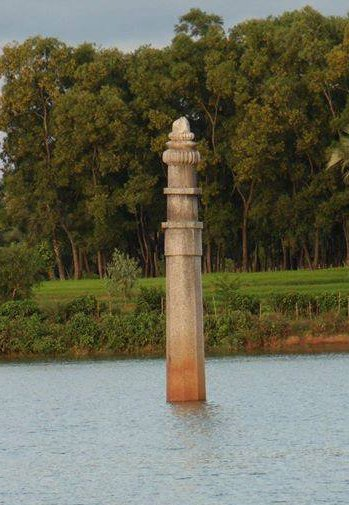 A View of Historical Dibor Dighi